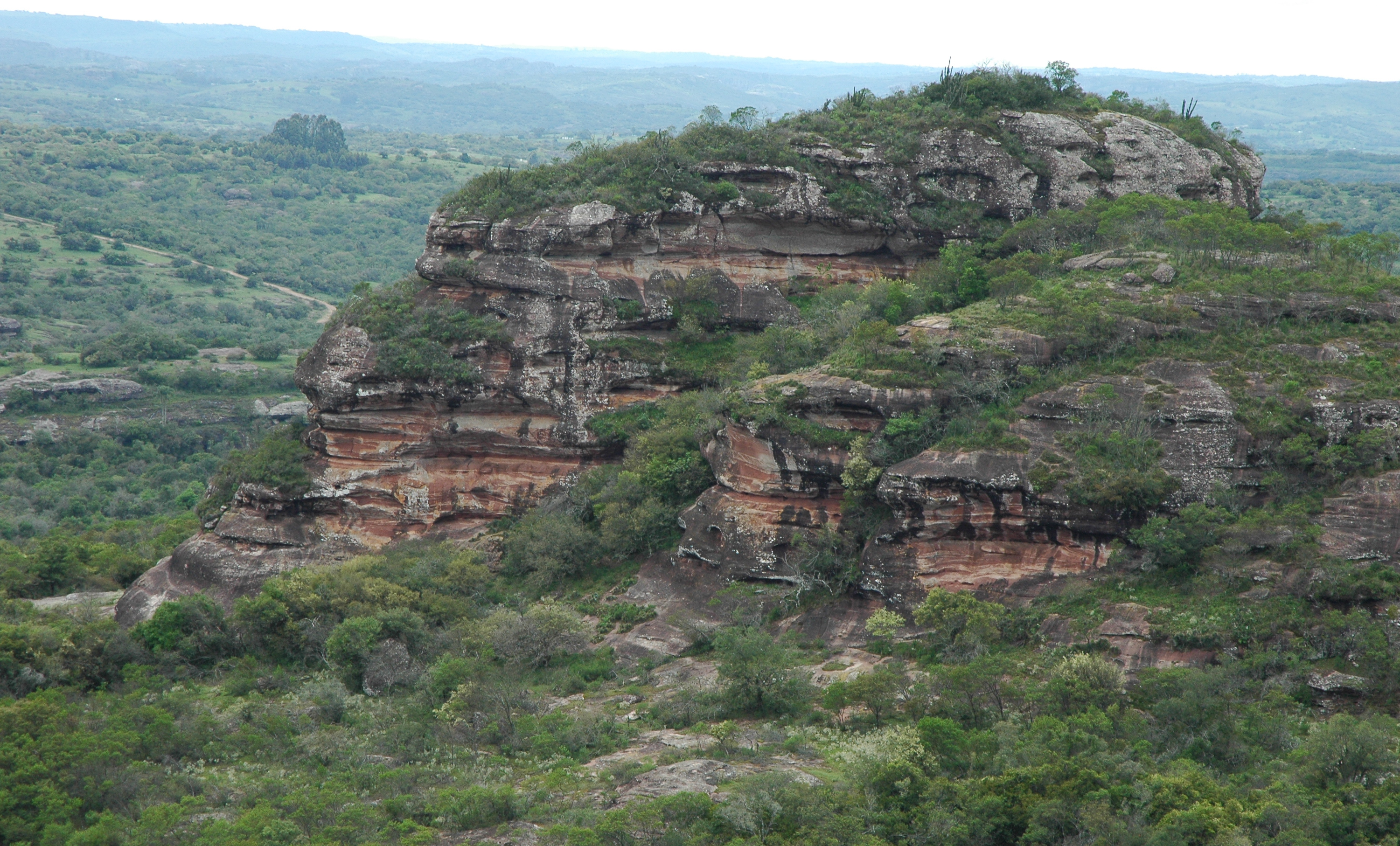 Paisagem das Guaritas, a cerca de 50 quilômetros da cidade brasileira de Caçapava do Sul.